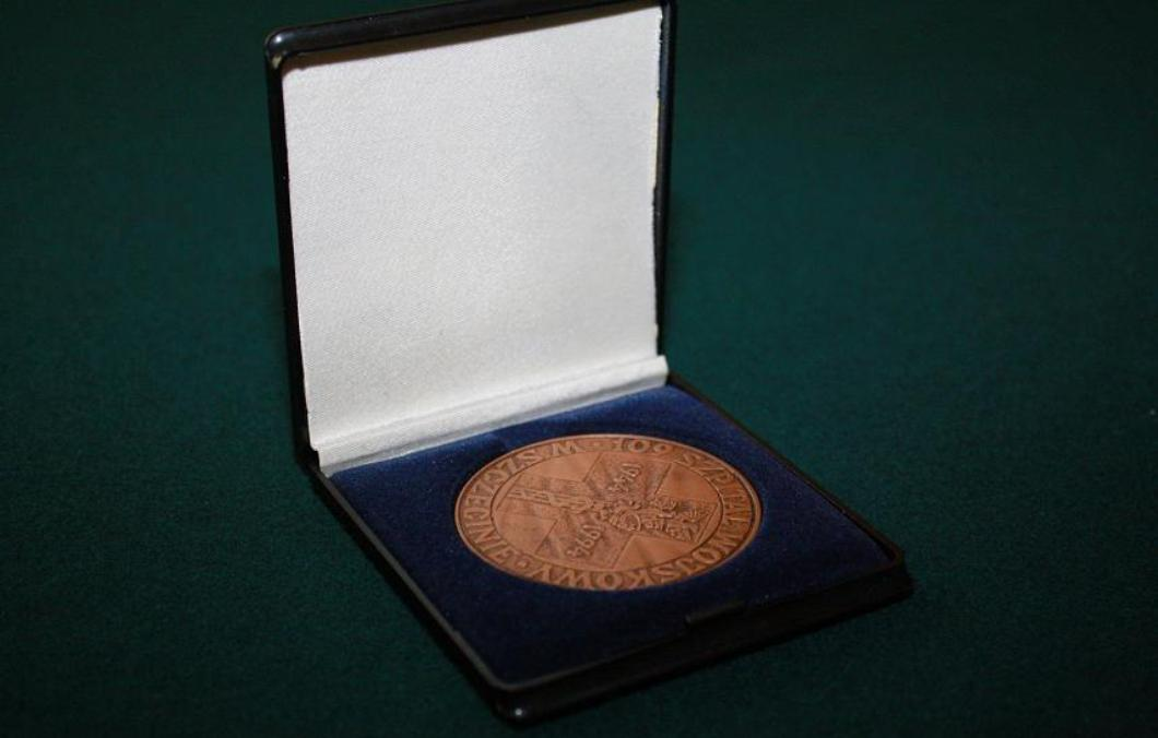 Medal dla 109 Szpitala Wojskowego